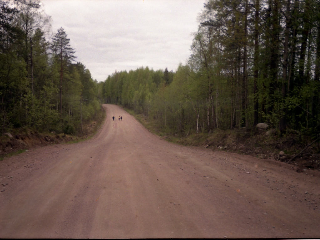 Р-21